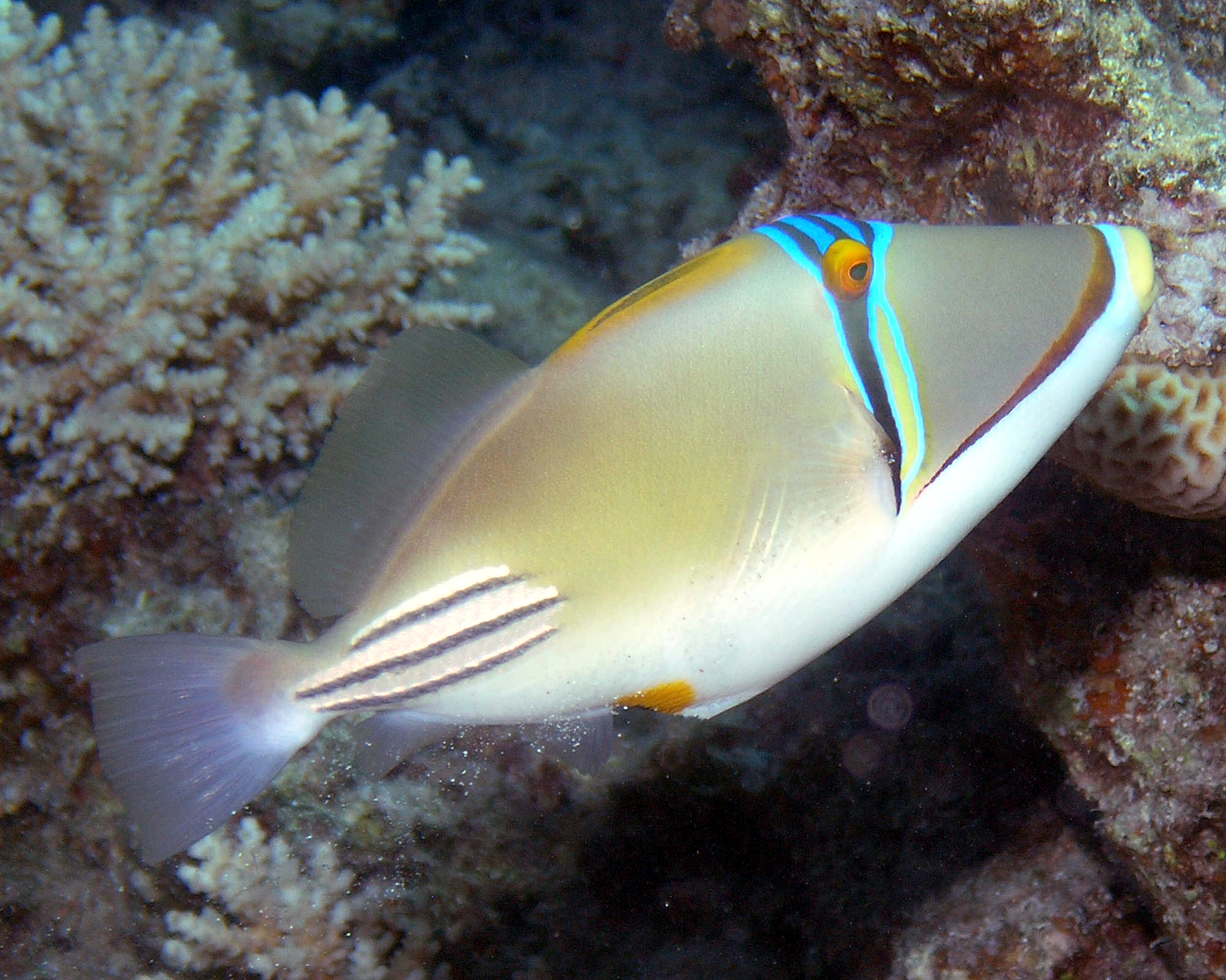 Rotmeer-Picassodrückerfisch (Rhinecanthus assasi)